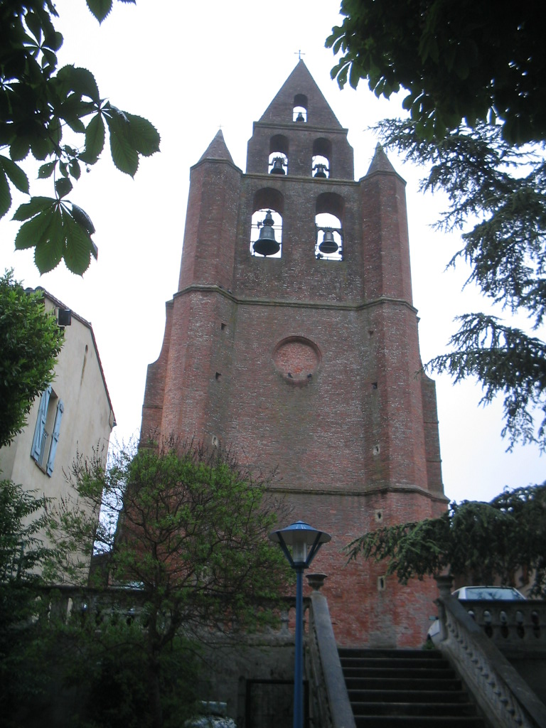 Église Saint-Martin de Nailloux